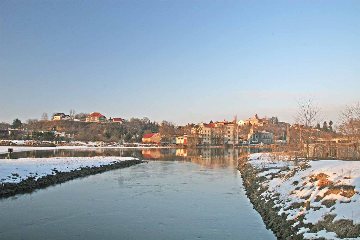 Pohled na Týnec nad Labem od jezu